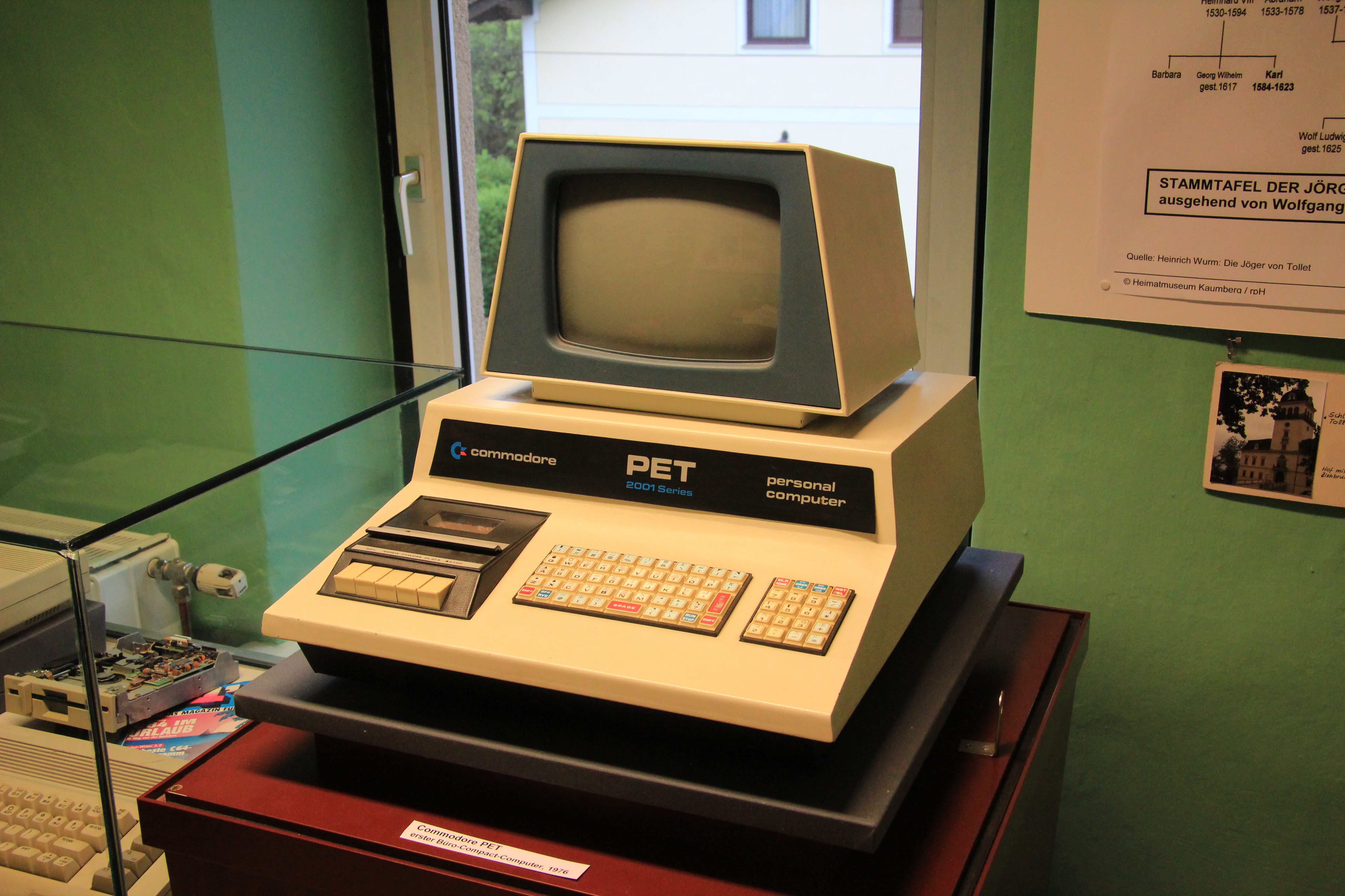 Computer Commodore PET 2001 im Heimatmuseum Kaumberg in Niederösterreich